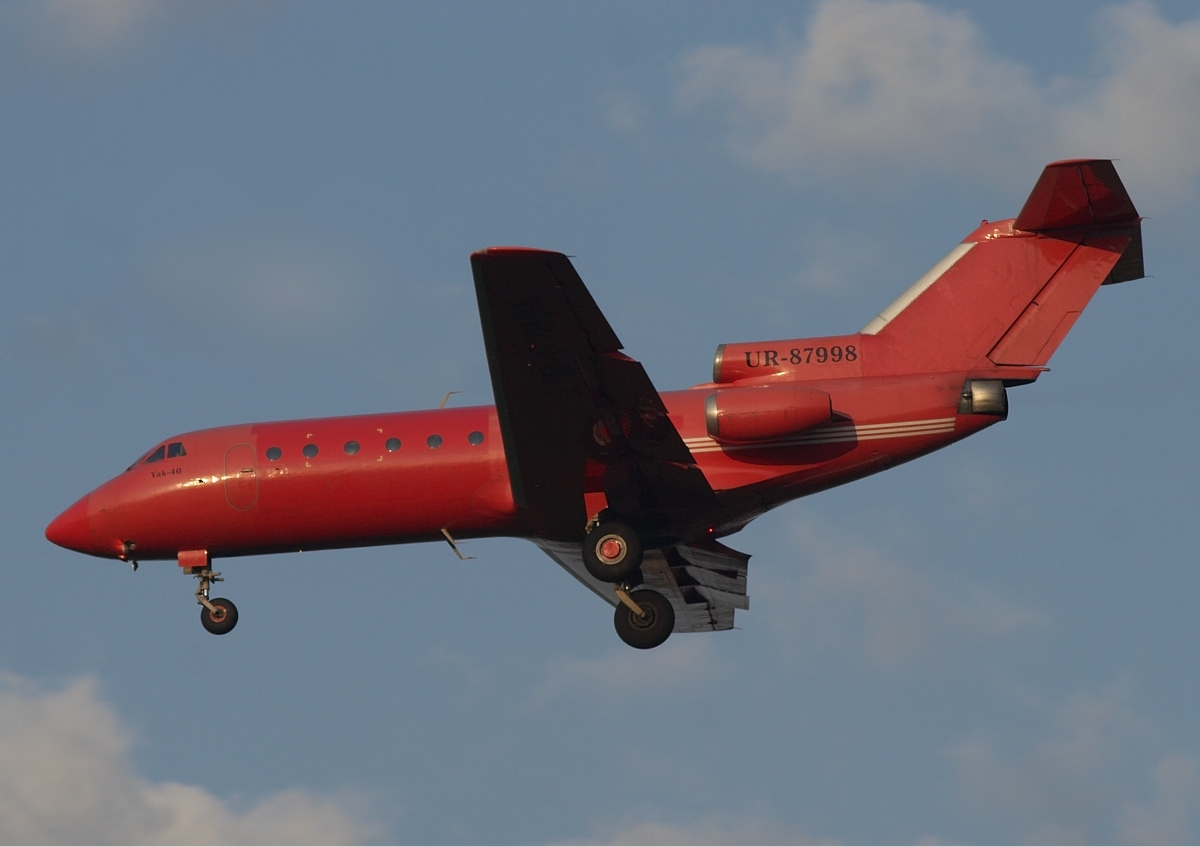 Aerostar Yakovlev Yak-40